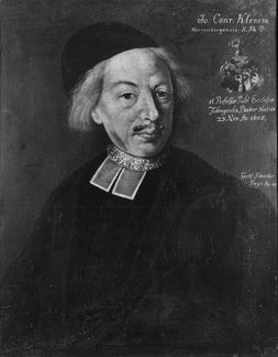 Theologieprofessor Johann Conrad Klemm (Öl auf Leinwand; Gemälde in der Professorengalerie Tübingen)